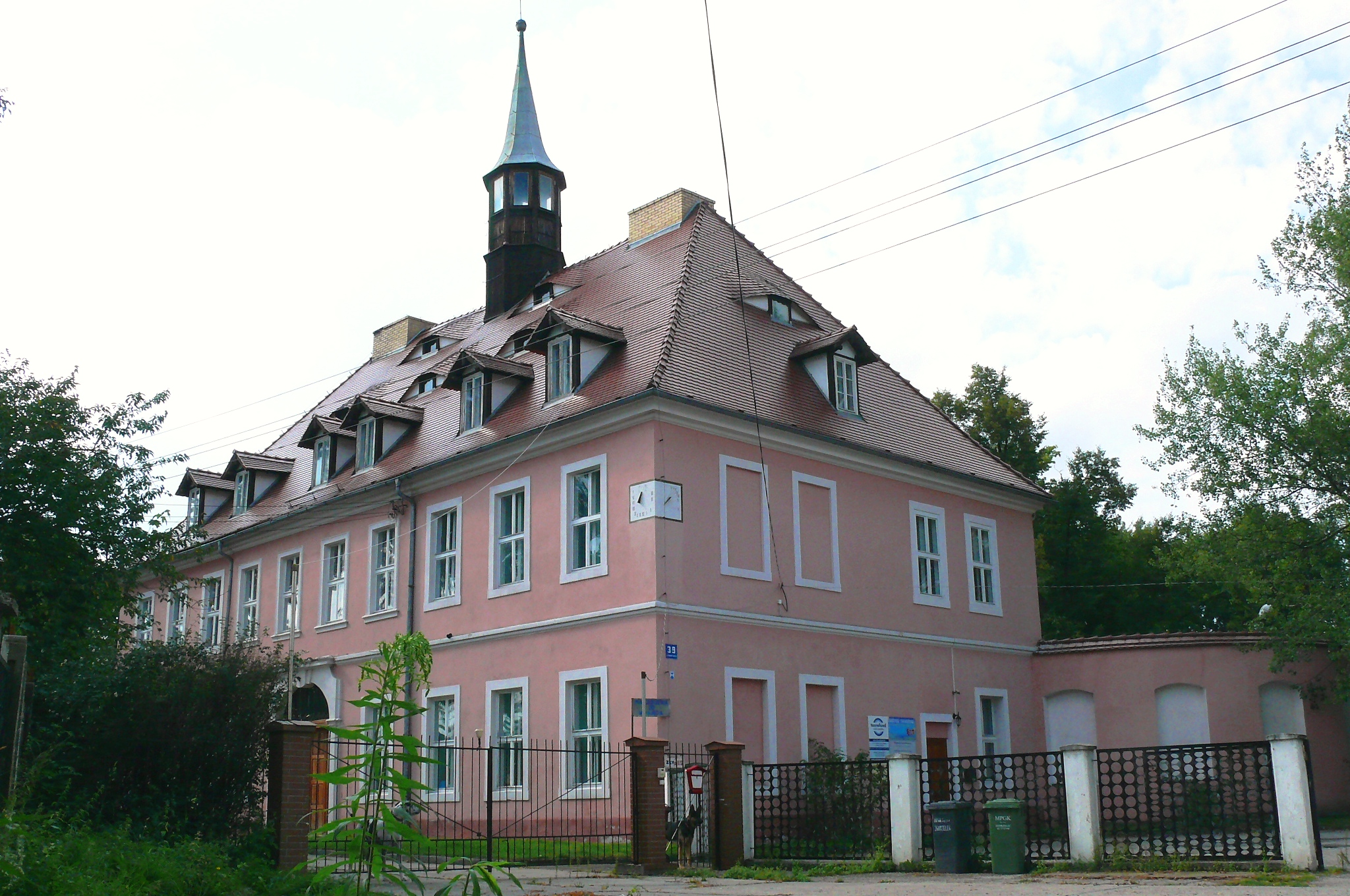 Zgorzelec, ul. Francuska 39 - dwór „Dolny Ujazd” („Nieder Moys”), obecnie dom mieszkalny (zabytek nr 601/J z 20.02.1978)